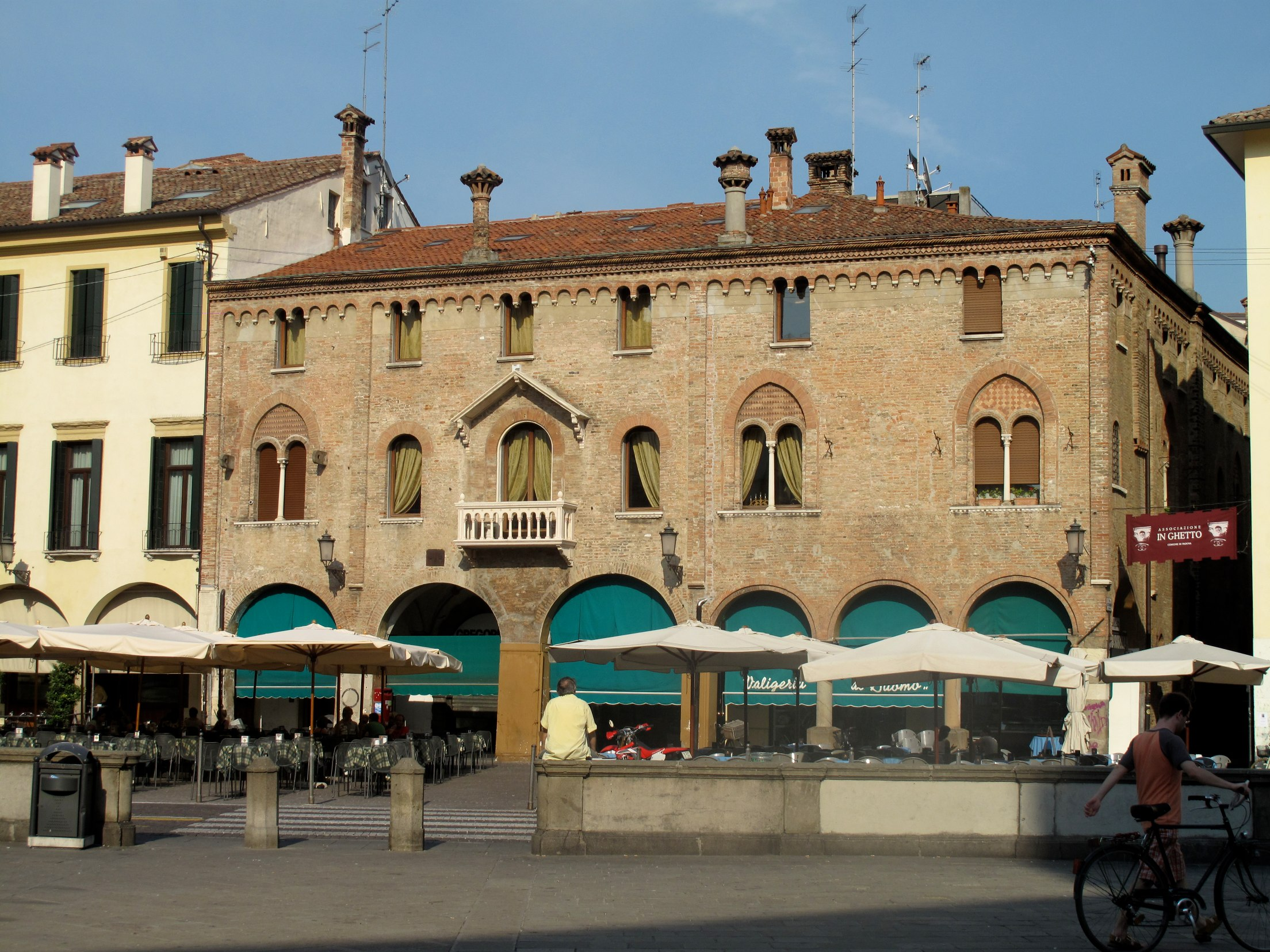 Padova juil 09 48